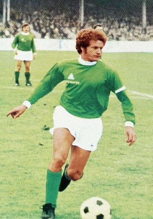 Robert Herbin en 1971, 'Ageducatifs Football 1971 - 1972', Panini figurina n°254.